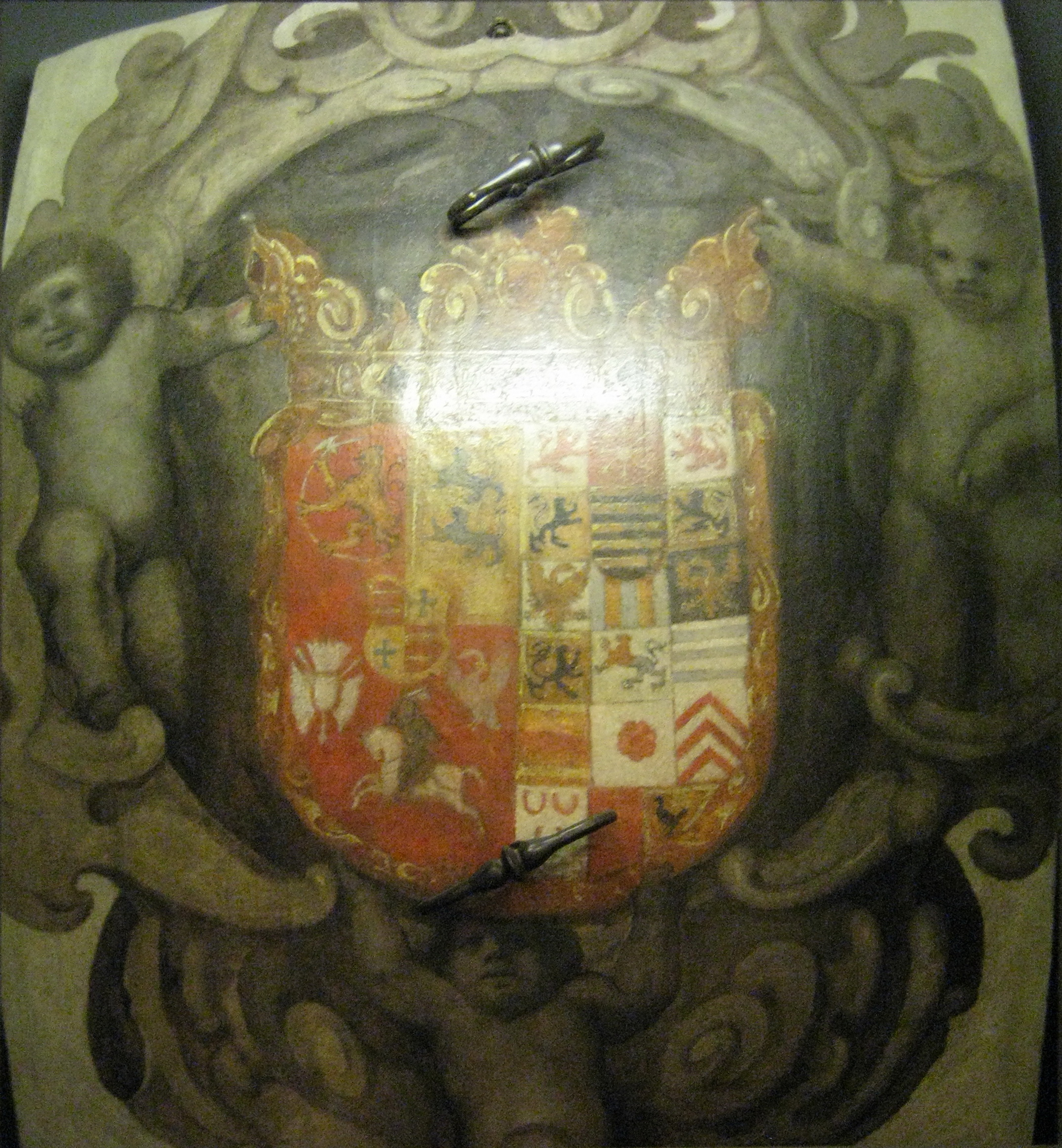 Готторпский глобус. Единственная сохранившаяся деталь первого глобуса — ныне в экспозиции Кунсткамеры. Это дверь, украшенная геральдическим щитом Гольштейн-Готторпского герцогства. На момент пожара дверца находилась в подвале и поэтому не пострадала. Во время Второй мировой войны она была вывезена в Германию, а в 1948 году возвращена.